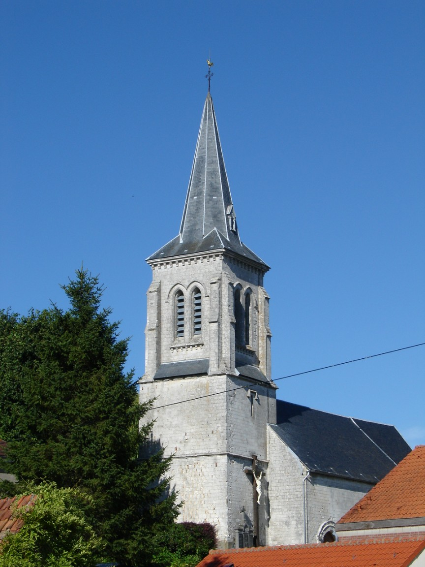 Église de Coulomby